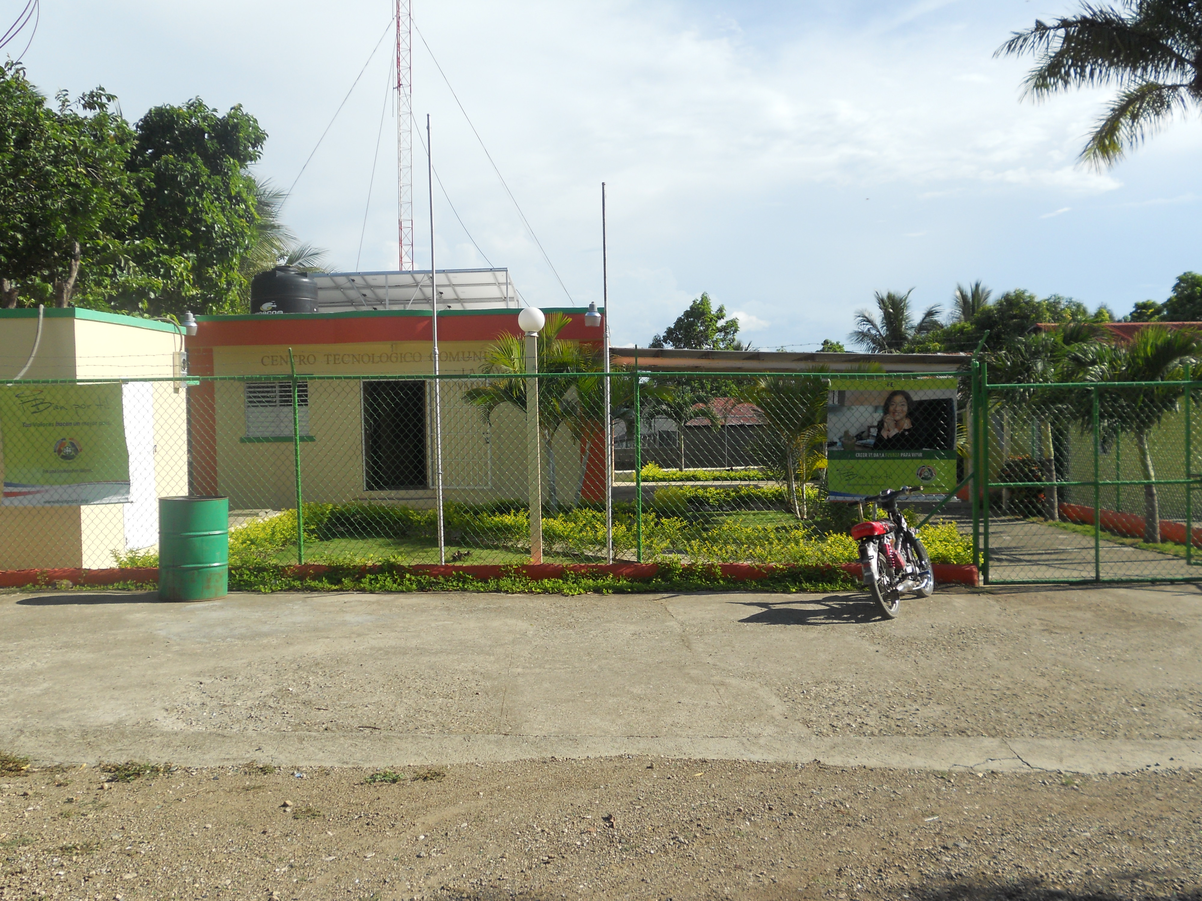 Centro Tecnologico Comunitario de La Caya